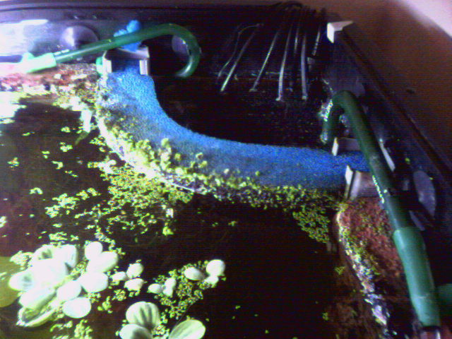 Mattenfilter (HMF) nach einem Jahr